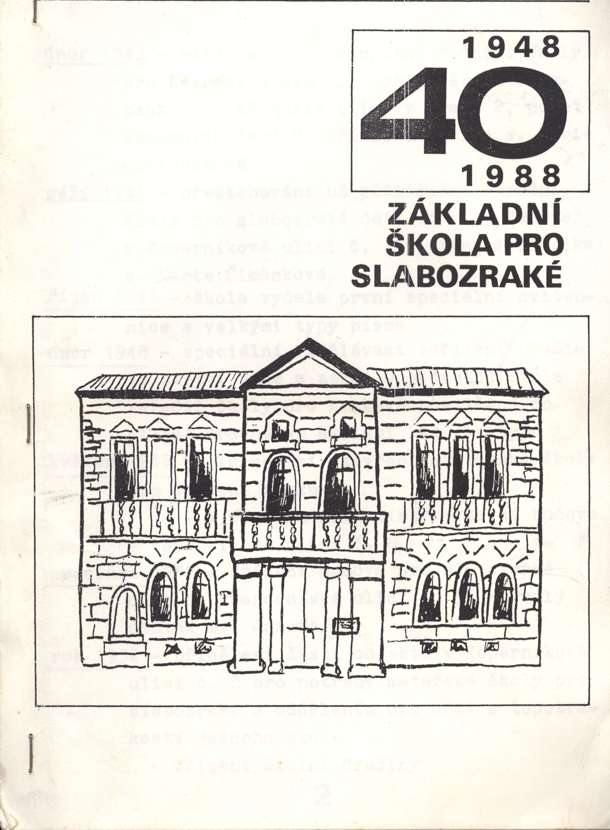 titulní list žákovského časopisu k 40. výročí Základní devítileté školy pro slabozraké (1948-1988)